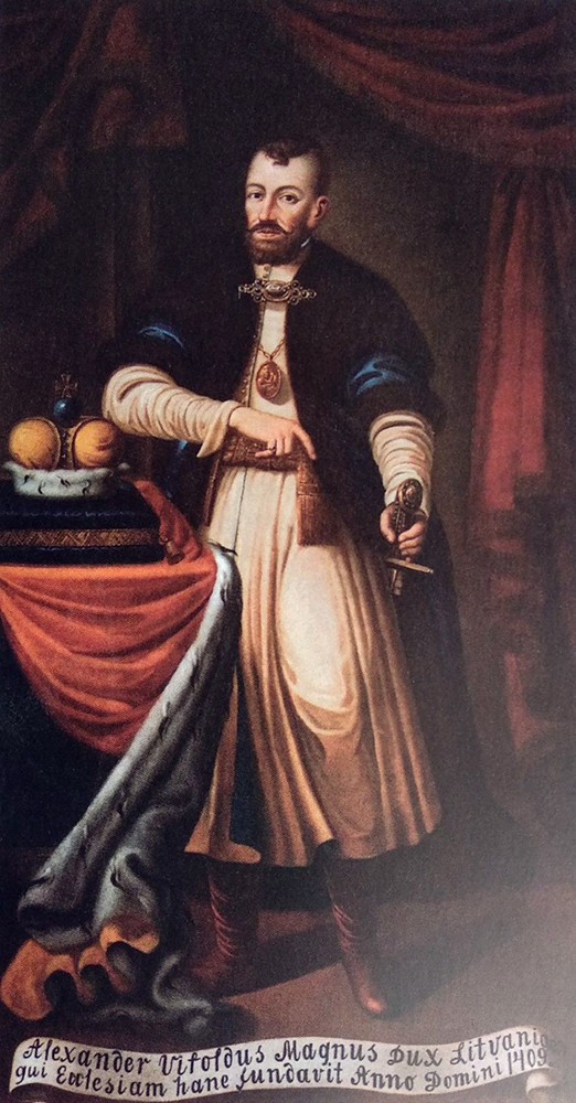 Беларуская (тарашкевіца): Партрэт Вітаўта Вялікага (Vitaŭt Vialiki) з касьцёла Найсьвяцейшай Панны Марыі ў Троках